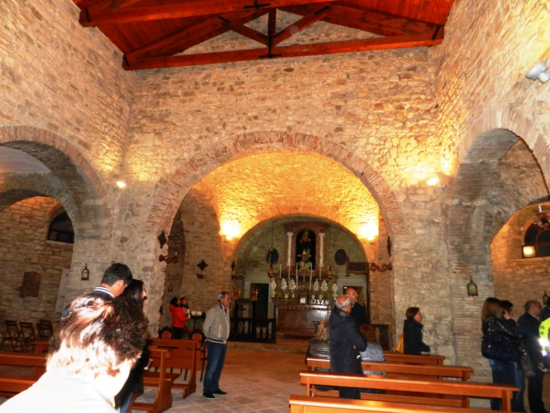 La chiesa di Santa Maria dei Greci (XI secolo) a Molinara, in provincia di Benevento